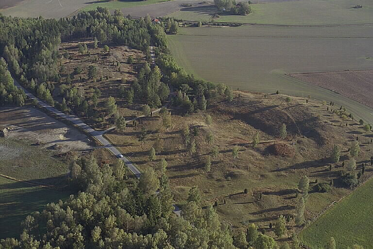 Gravfält Motiv: Ytterselö 93:1 Nyckelord: Flygbilder, Riksintressen Kategori: Grav- och boplatsområde Gravfält. Ytterselö 93:1.